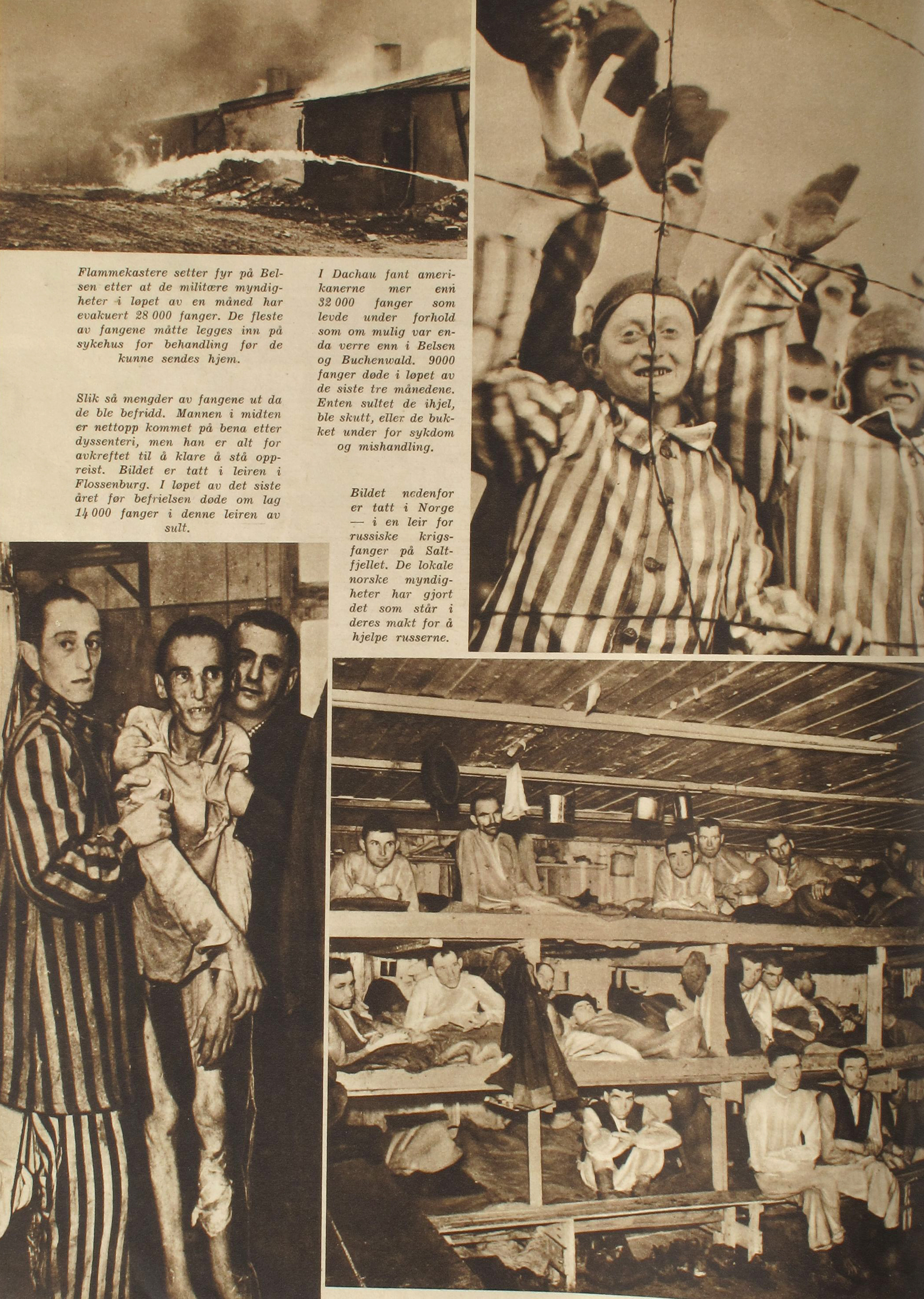 krigsfanger 1945 Fra Aktuell juni 1945